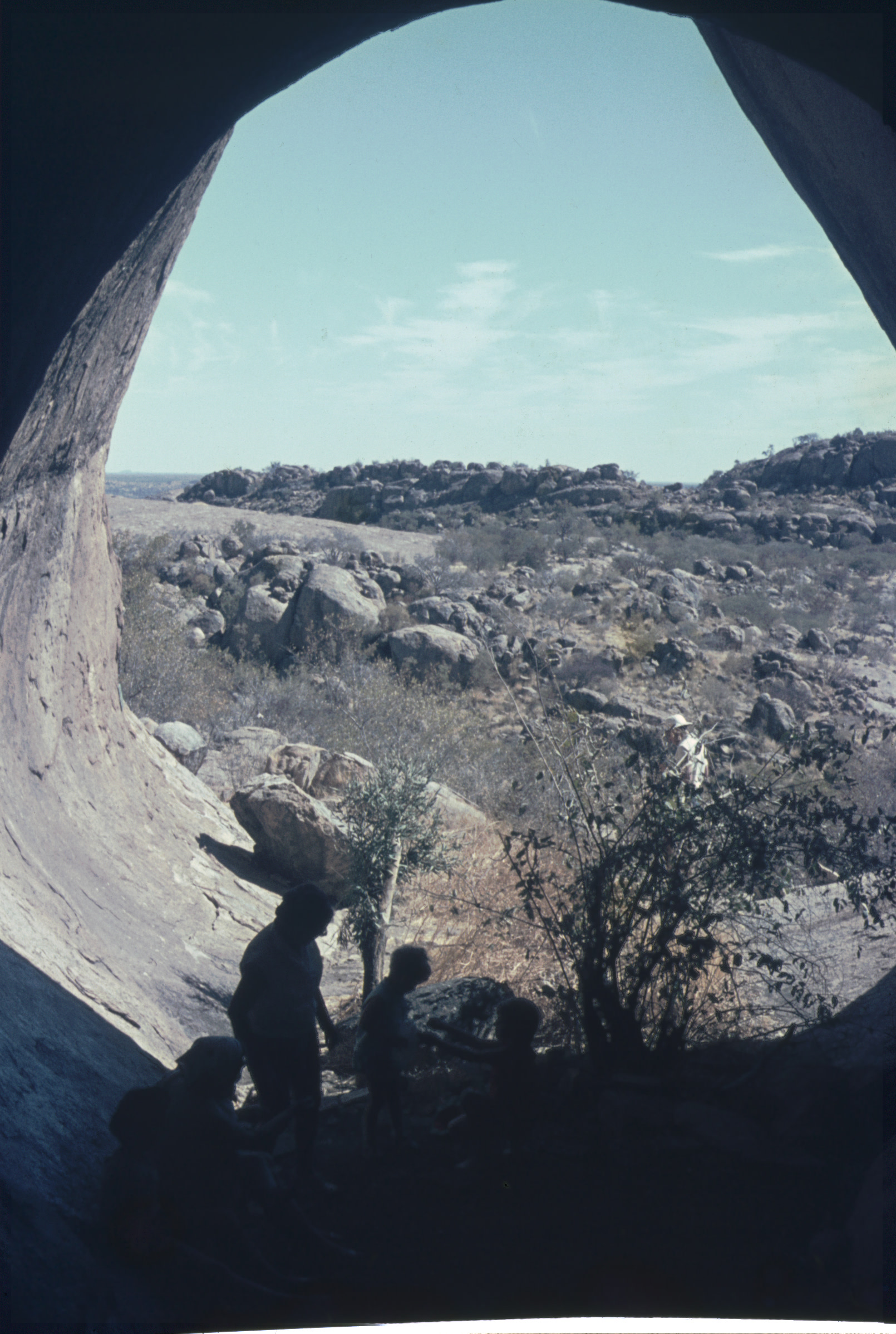 Blick aus der Paula-Höhle am 07.08.1966. Diapositiv 35 mm.